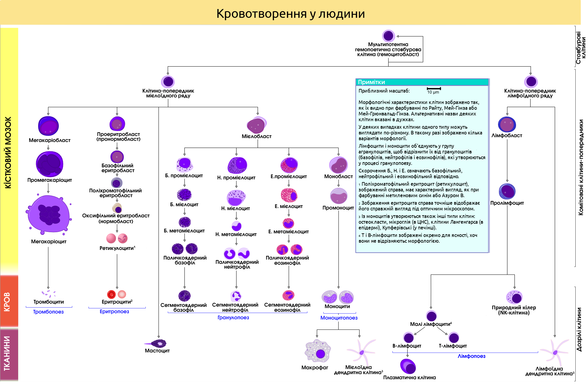 Детальна схема кровотворення у людини